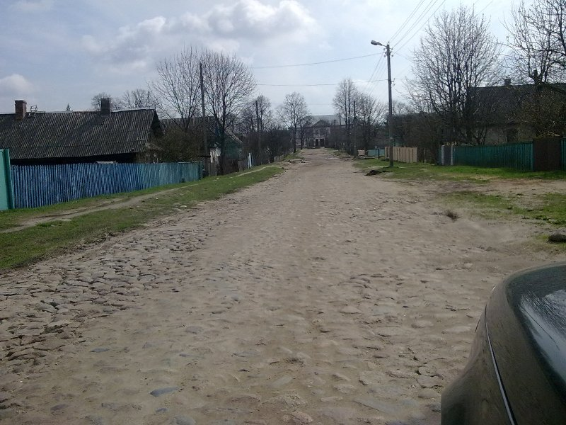 Брукаванка да сядзібы Патоцкіх